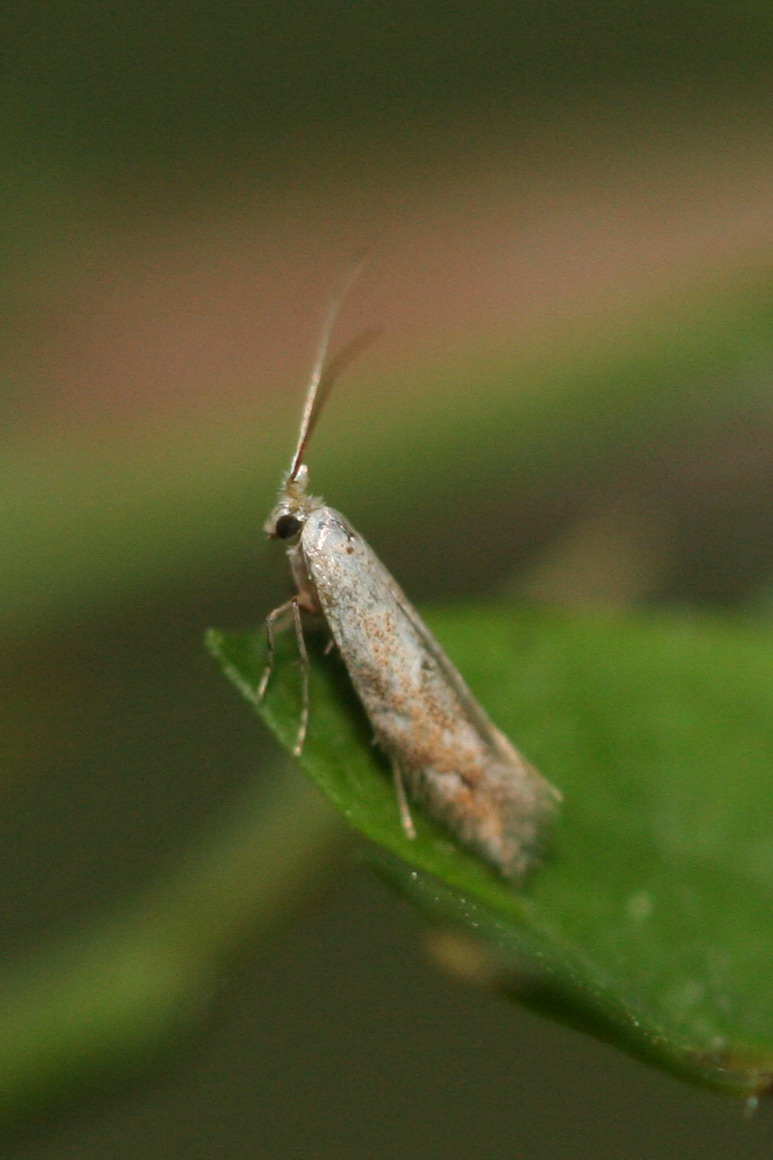 Bucculatricidae